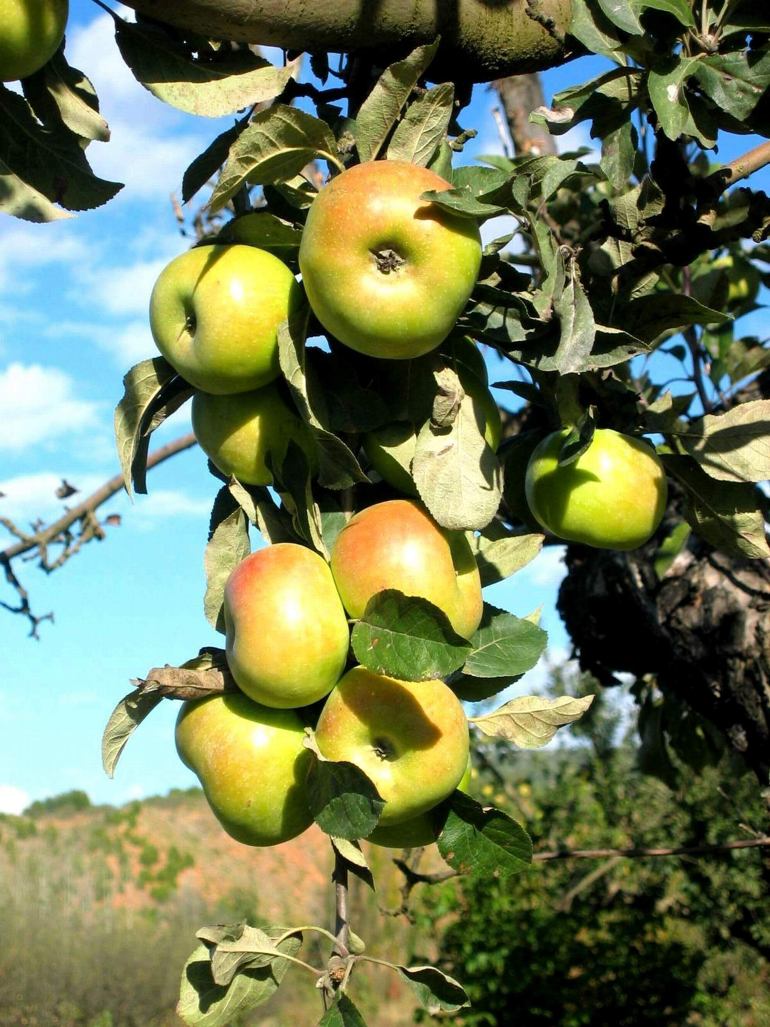 Detalle de manzanas esperiegas en el árbol, huerta de Torrebaja (Valencia), 2006.